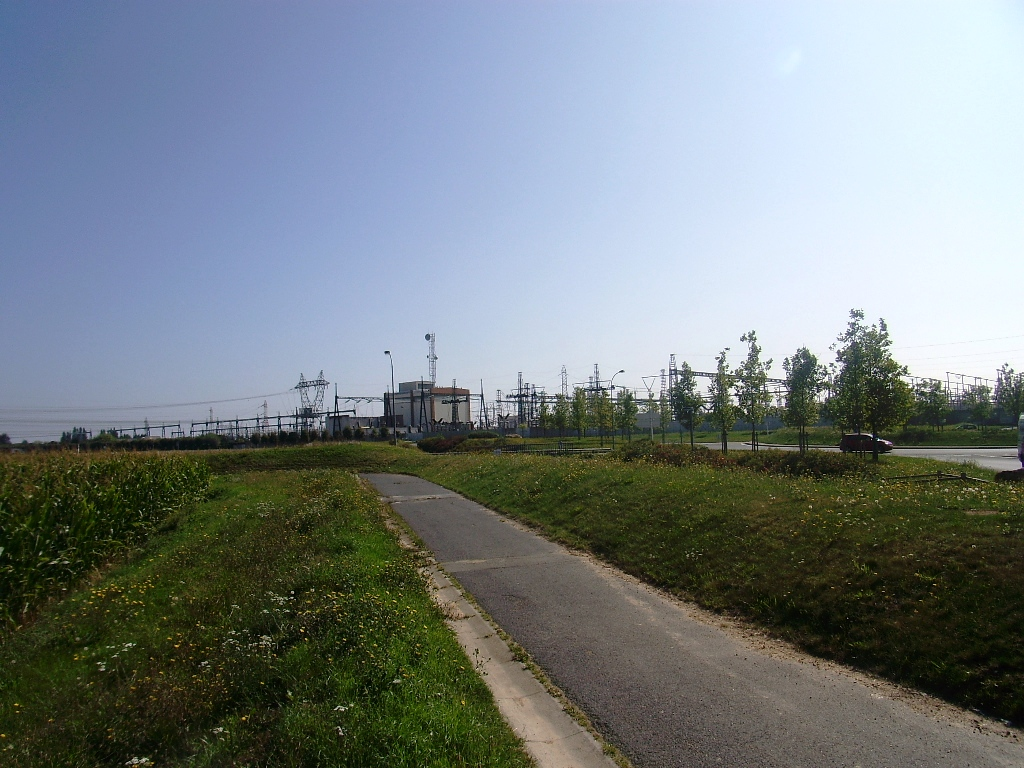 Centre de répartition EDF de Villejust (91)